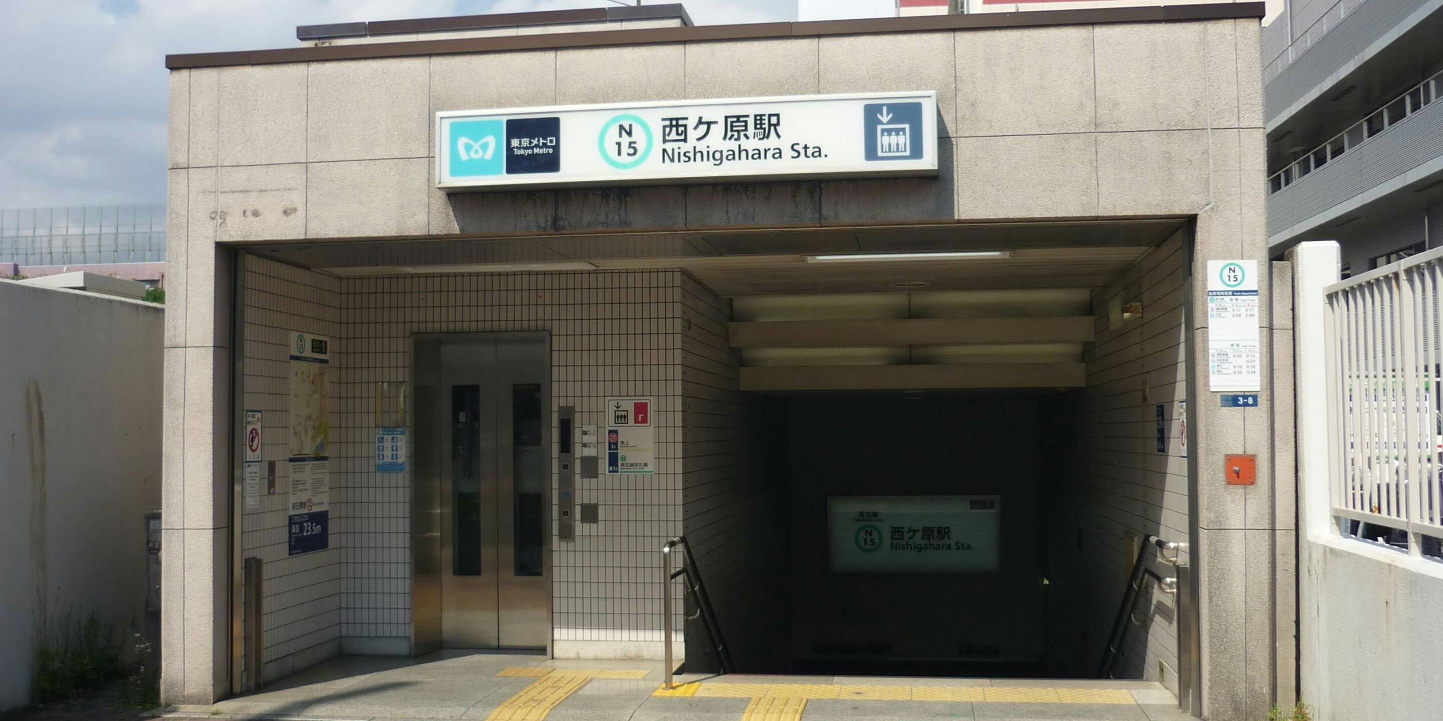 西ヶ原駅入口